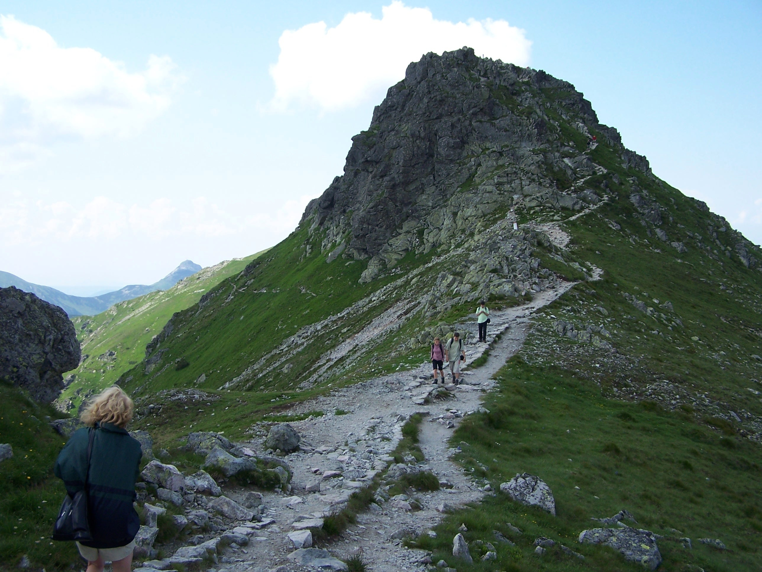 Beskid i przełęcz Wyżnie Liliowe